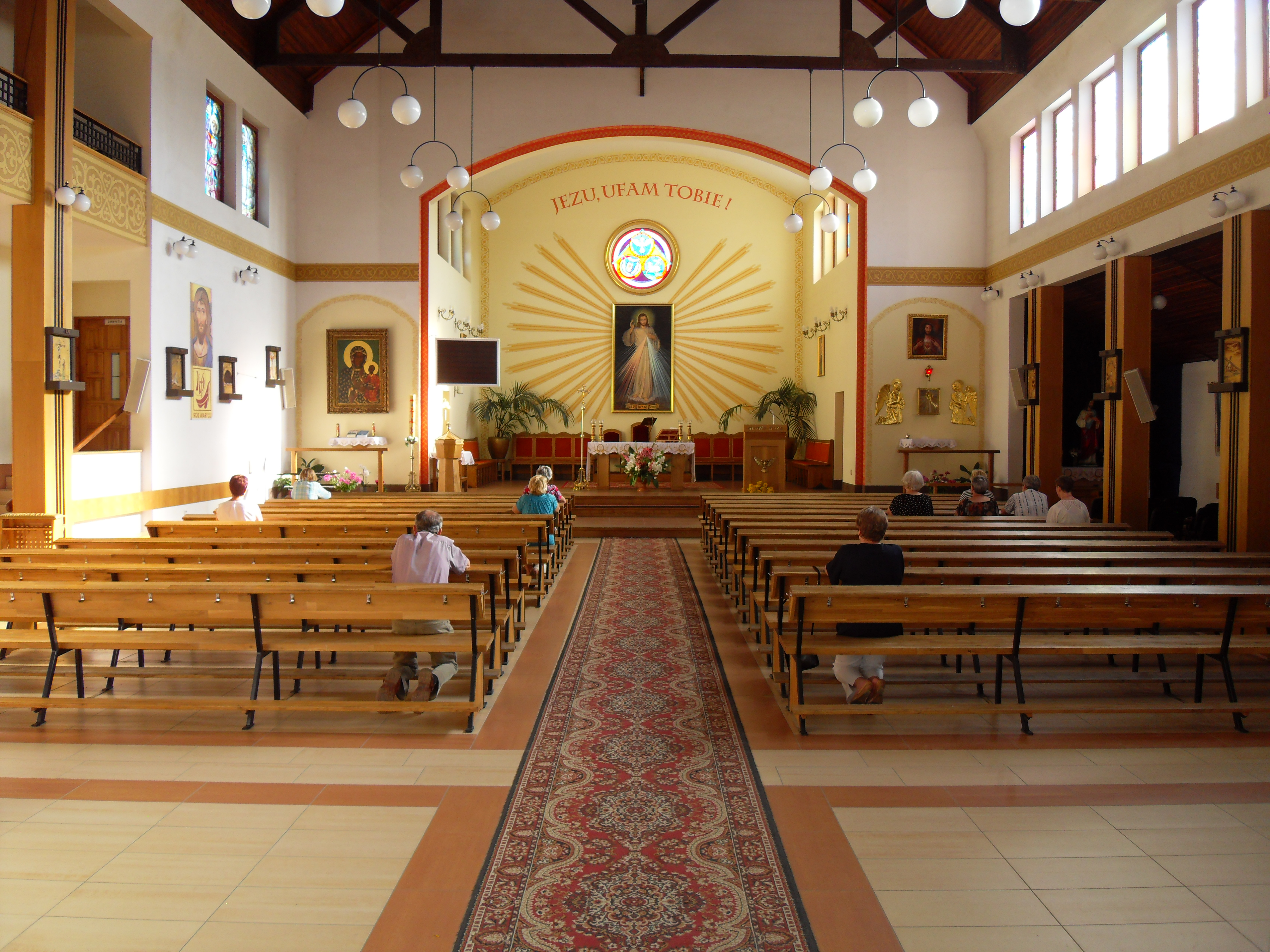 Gdańsk Migowo. Kościół Miłosierdzia Bożego, ul. Myśliwska 25, wnętrze.